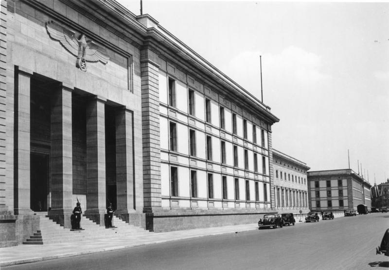 Reichsbahnzentrale für den Deutschen Reiseverkehr: Berlin, Die Neue Reichskanzlei, Frankl - Berlin, aufgenommen: August 1939